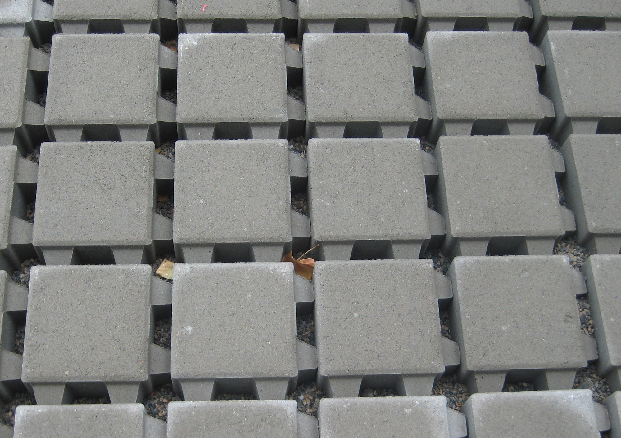 Betonsteinpflaster 20x20cm mit angeformten Abstandhalter 3cm für Splittfuge zur Versickerung von Regenwasser